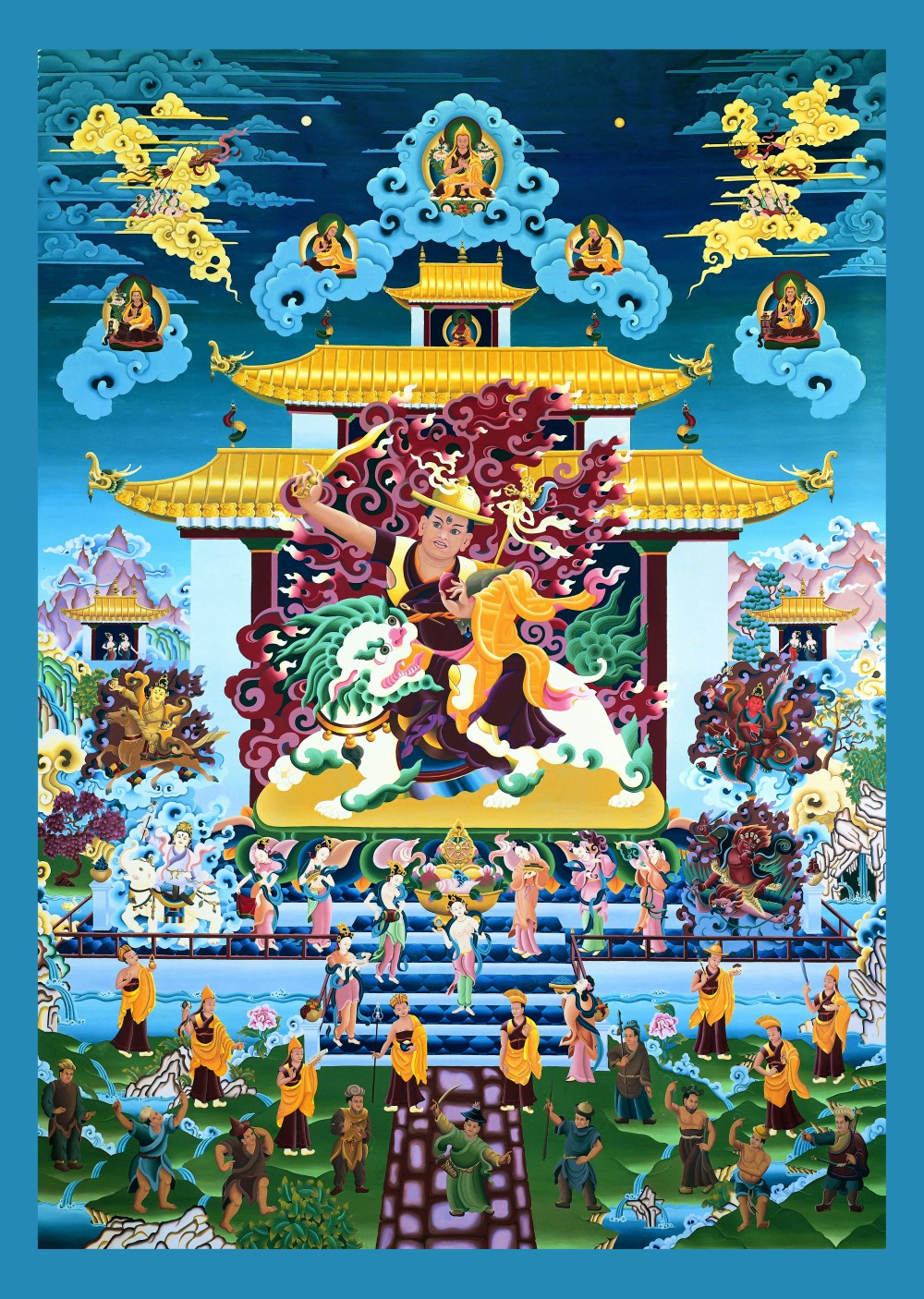 Abbildung des Mandalas der buddhistischen Gottheit Dorje Shugden